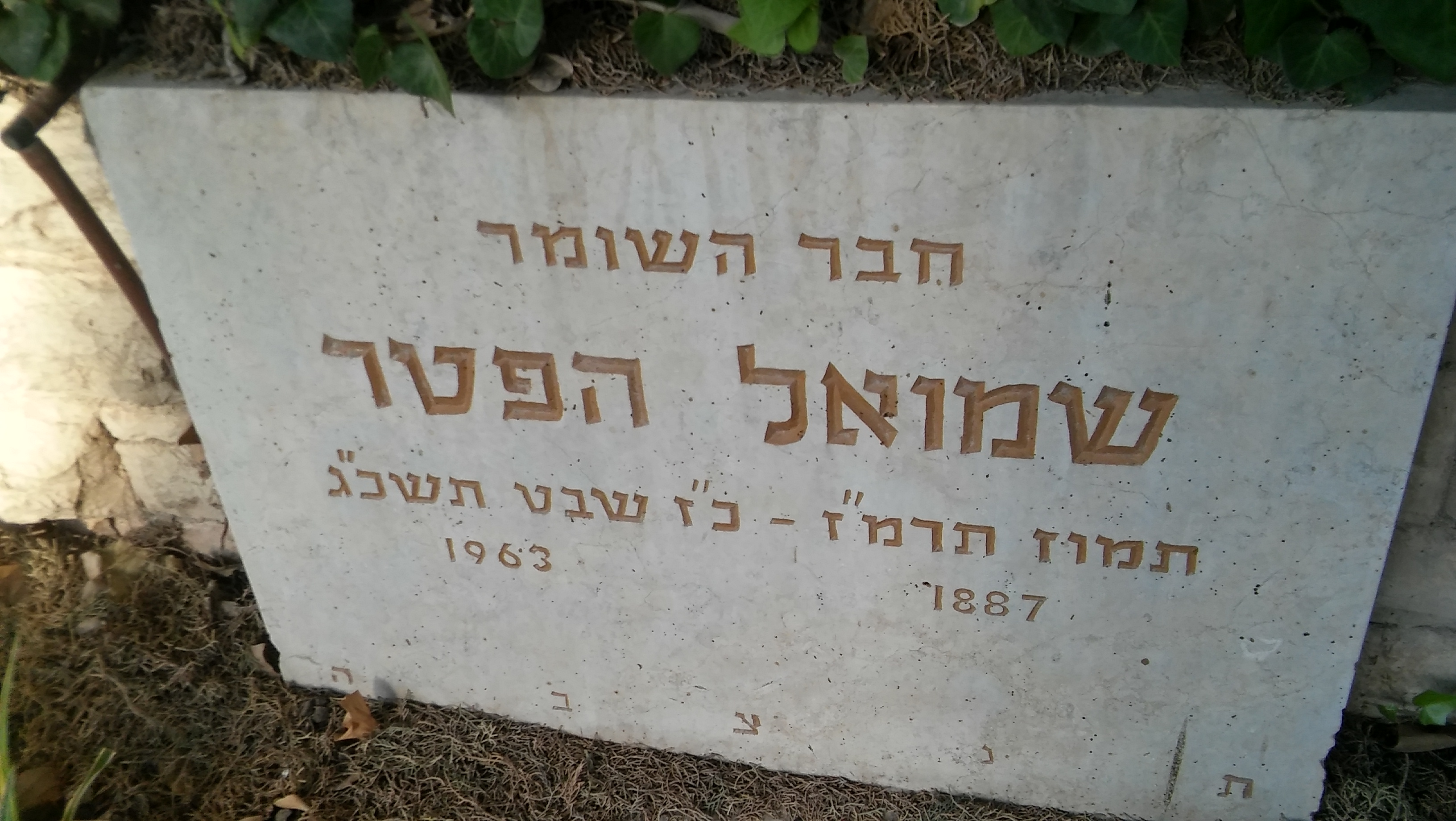 המצבה של שמואל הפטר בחלקת השומר בבית הקברות של כפר גלעדי